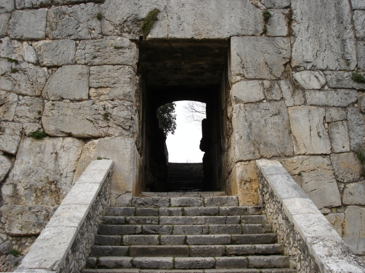 Questa foto è stata scattata da me. Ne autorizzo il libero uso su Wikipedia